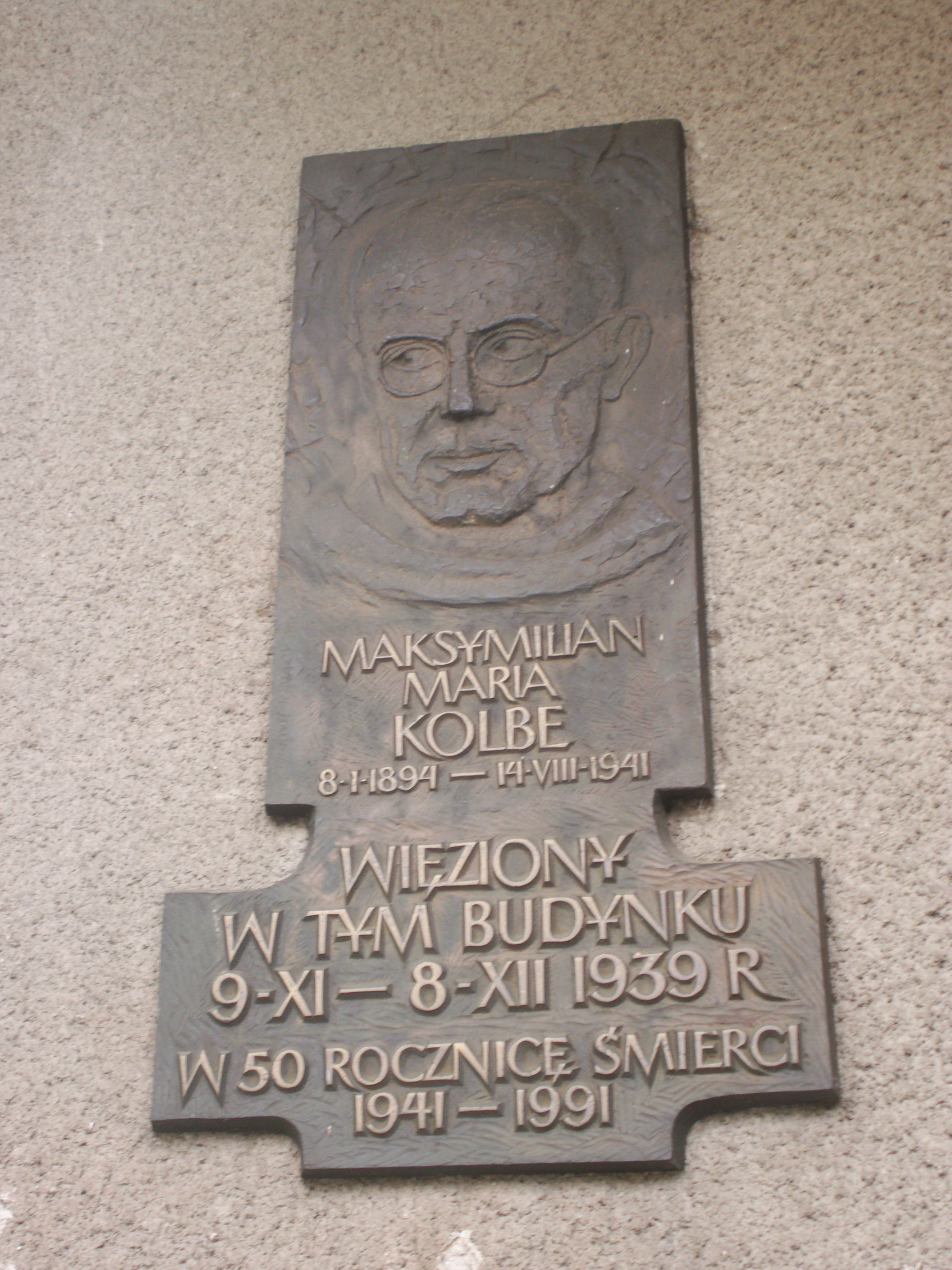 Tablica upamiętniająca pobyt w ostrzeszowskim liceum Maksymiliana Marii Kolbego